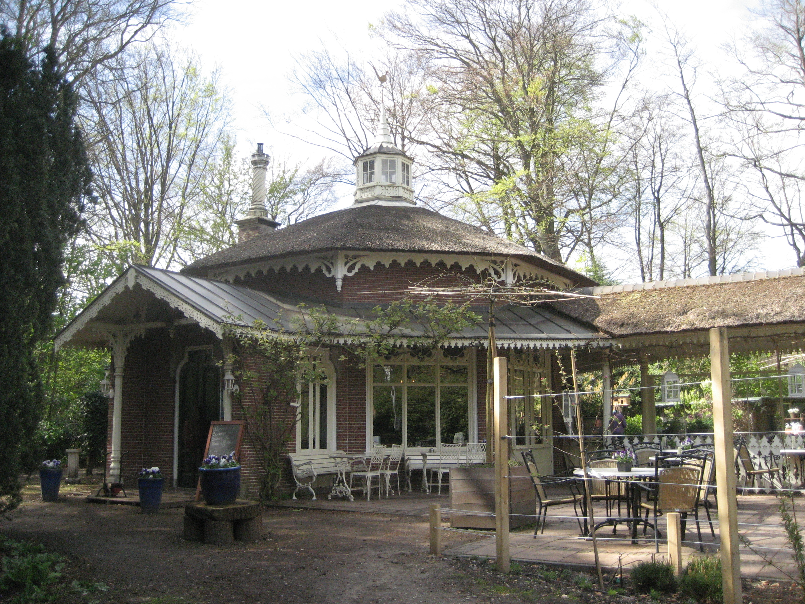 Landgoed De Horsten, Wassenaar/Voorschoten. Theehuis (vroeger jachthuis of schiethuis genoemd. Architect H.H.A. Wentzel